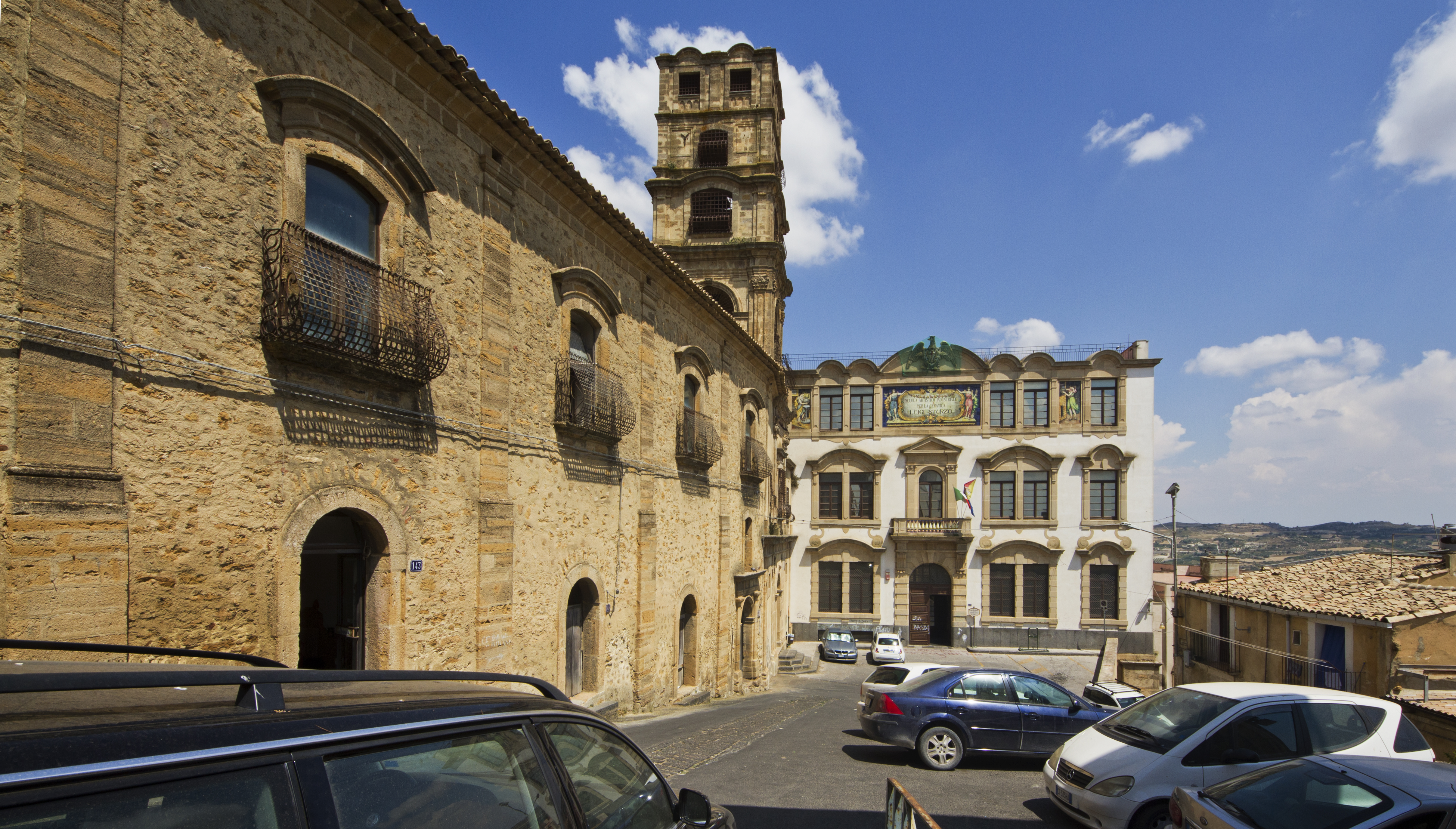 Liceo artistico